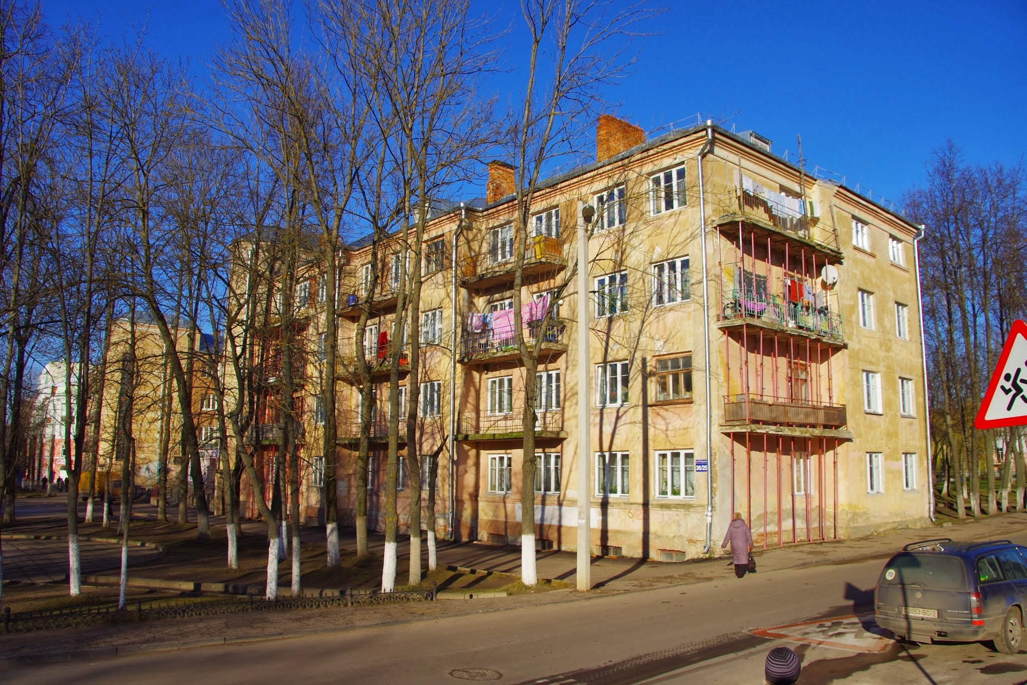 Pieršamajski rajon, Viciebsk, Belarus